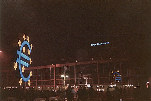 Blick auf das Eurosymbol Titel: Eurosymbol am Willy-Brandt-Platz